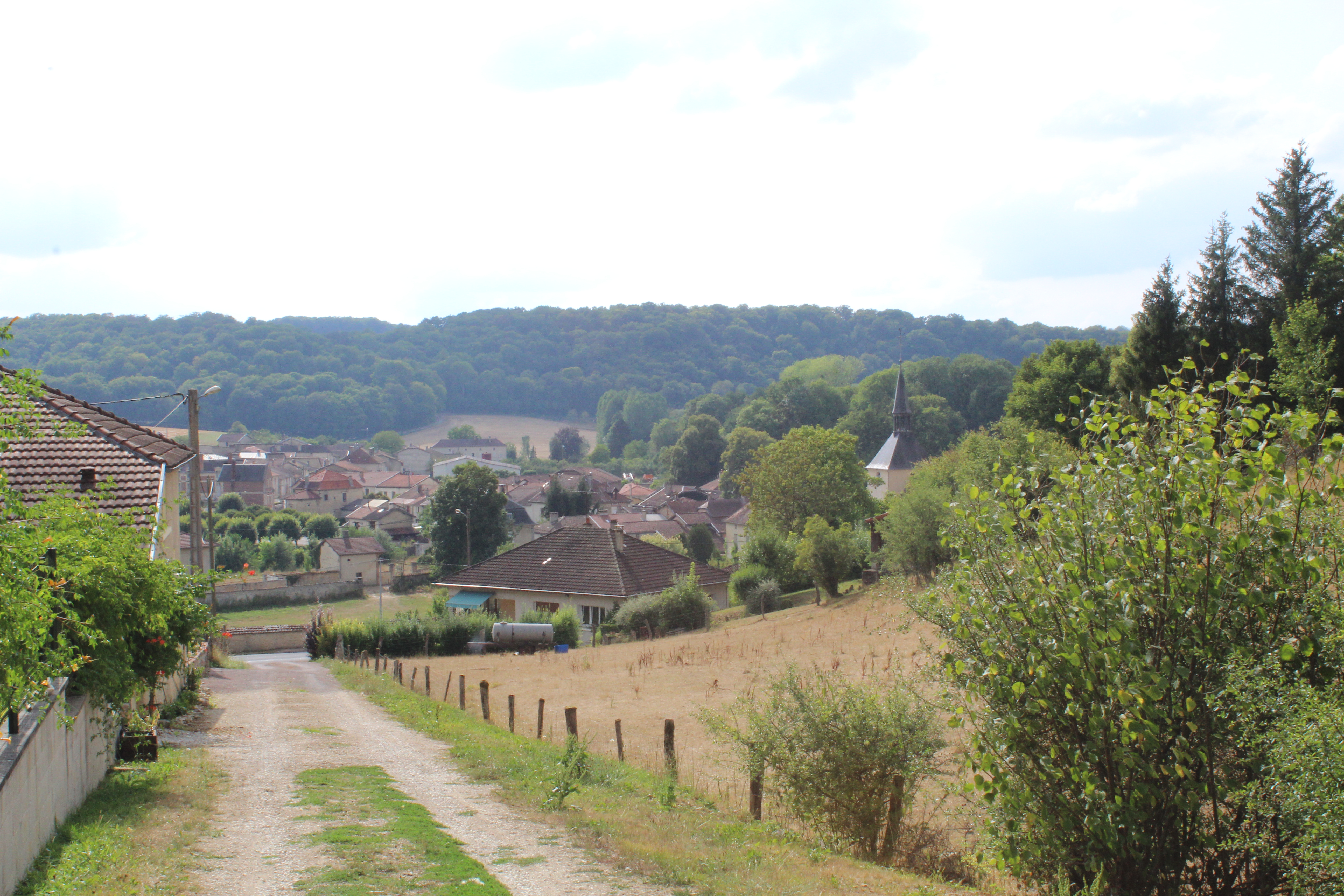 Panorama du village